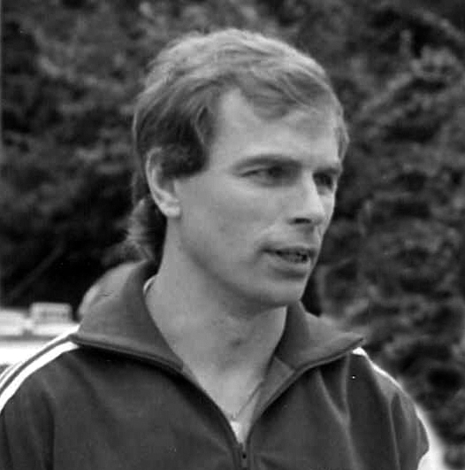 Bernard Dietz als Spieler des FC Schalke 04, 1985 Sonstiges: keine Varianten